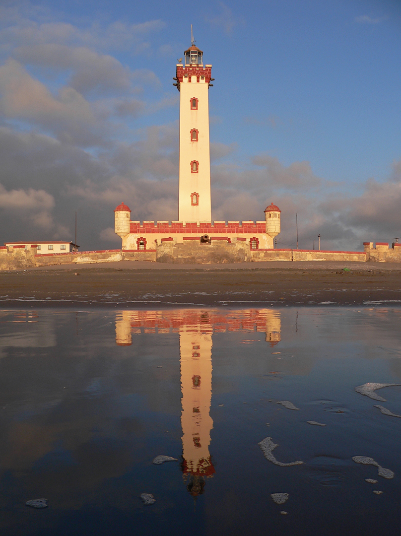 Faro Monumental de La Serena This is a photo of a national monument in Chile: 2184